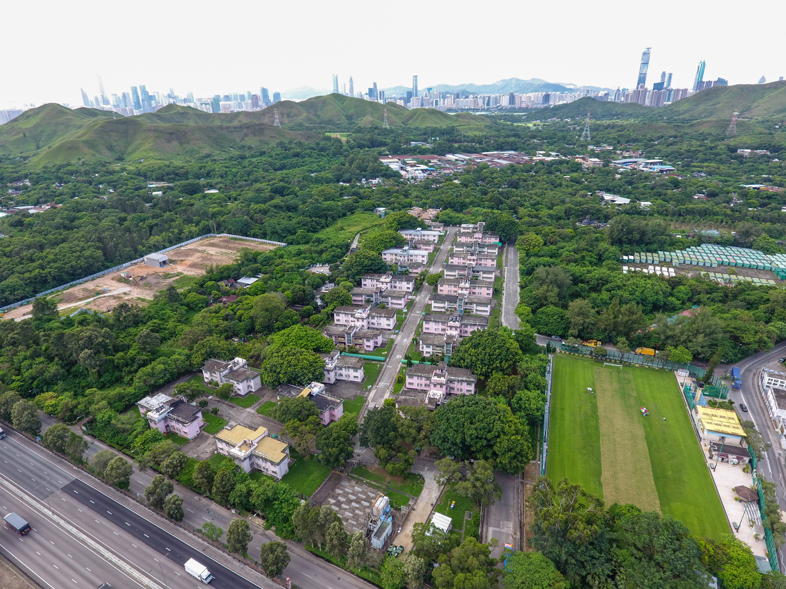 Dills Corner Quarters